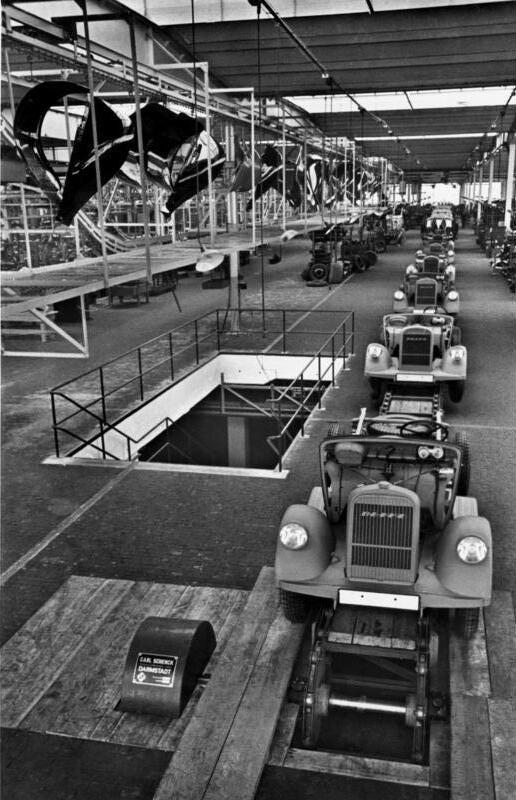 Brandenburg, Lkw-Produktion Scherl: Die neue Lastwagenfabrik, Werk Brandenburg, der Adam Opel A.G. Am Ende der großen Fertig-Montagbandes: bei einer Produktion von 50 Wagen in einer Schicht wird alle 10 Minuten ein Wagen fertig. 15469-36